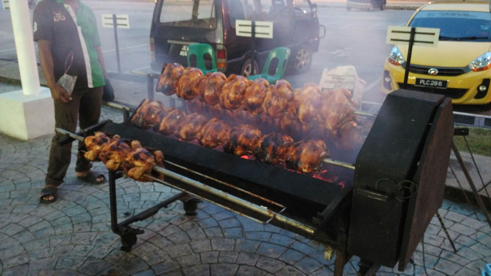 Ayam golek yang sedang dipanggang.